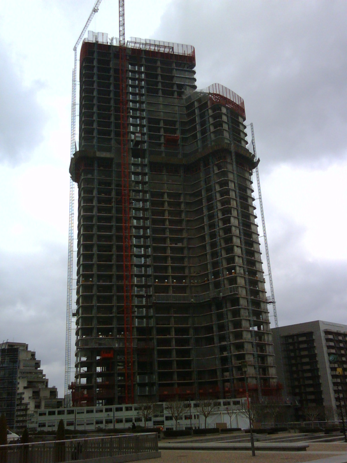 Tour First (en construction) au 24 mars 2009.